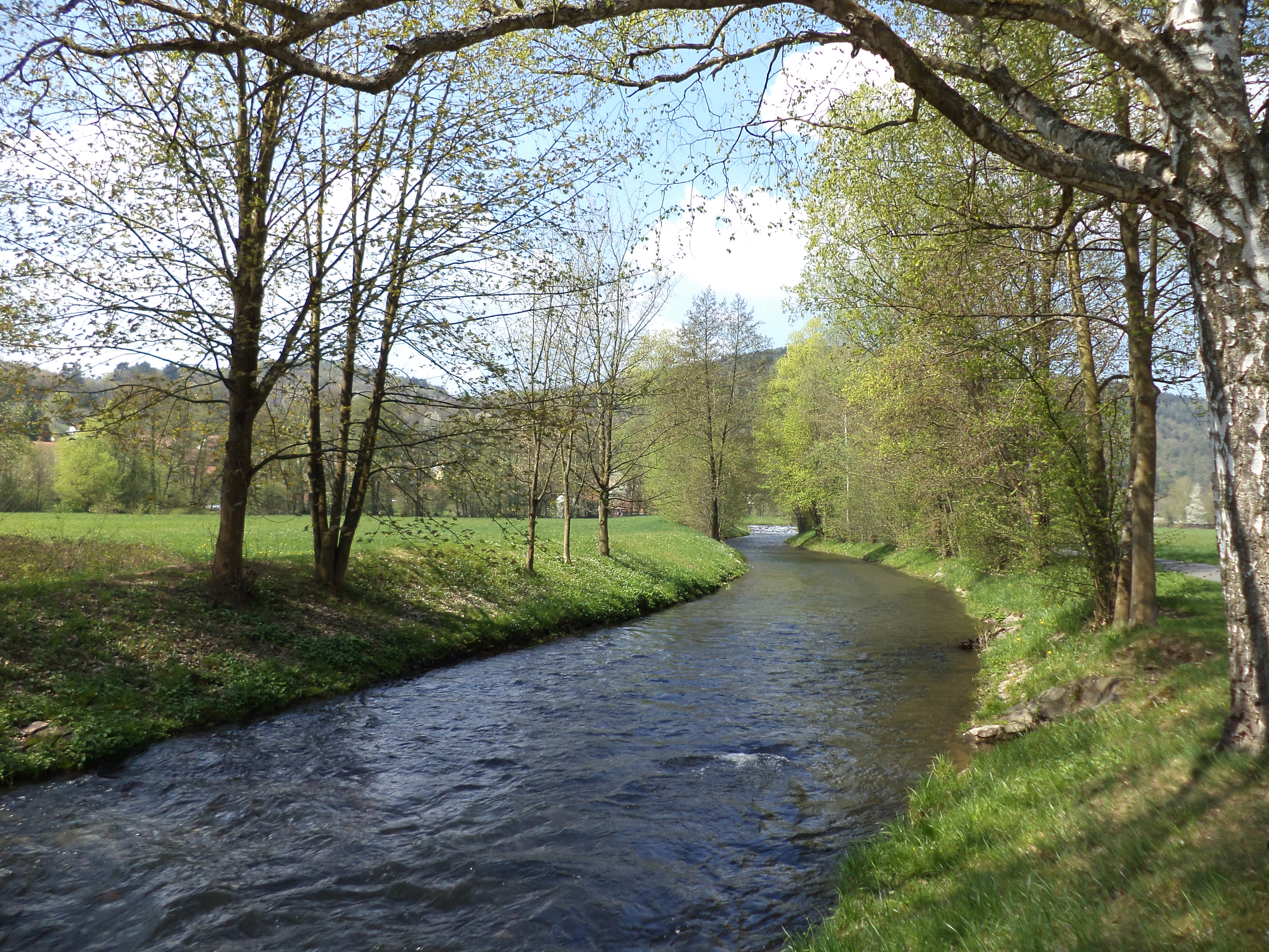 Der Fluss Lohr in Lohr am Main